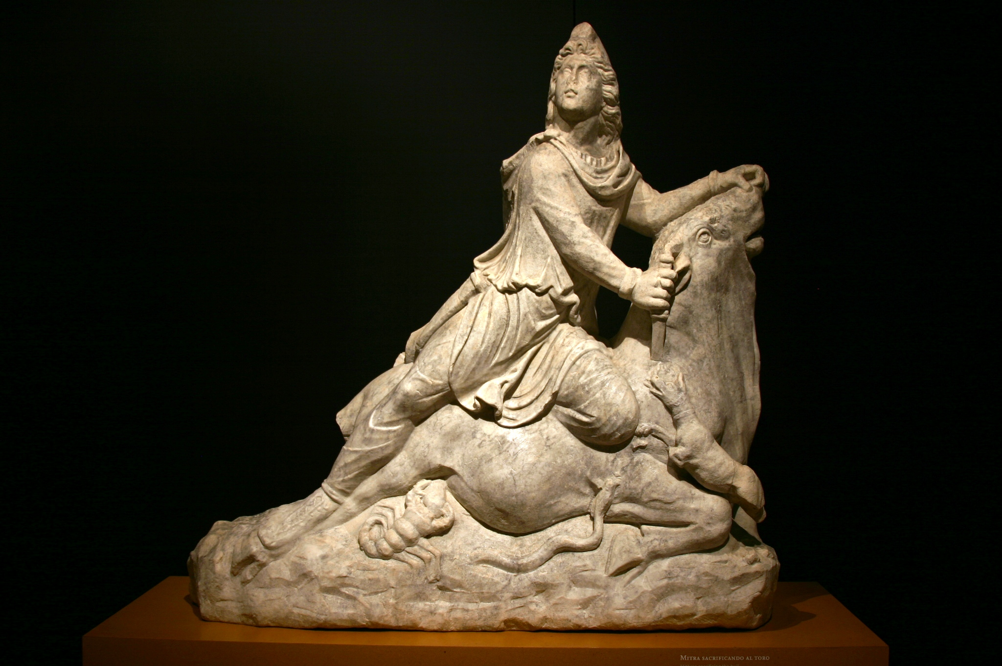 Representación de Mitra sacrificando un toro (siglo II). Museo Arqueológico y Etnológico de Córdoba (España).